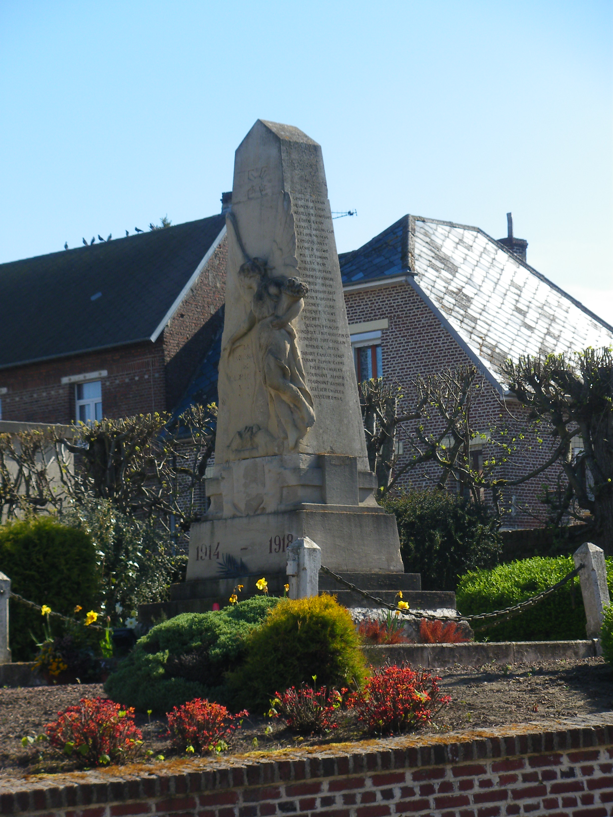 Vue du monument aux morts de Vaulx-Vraucourt.